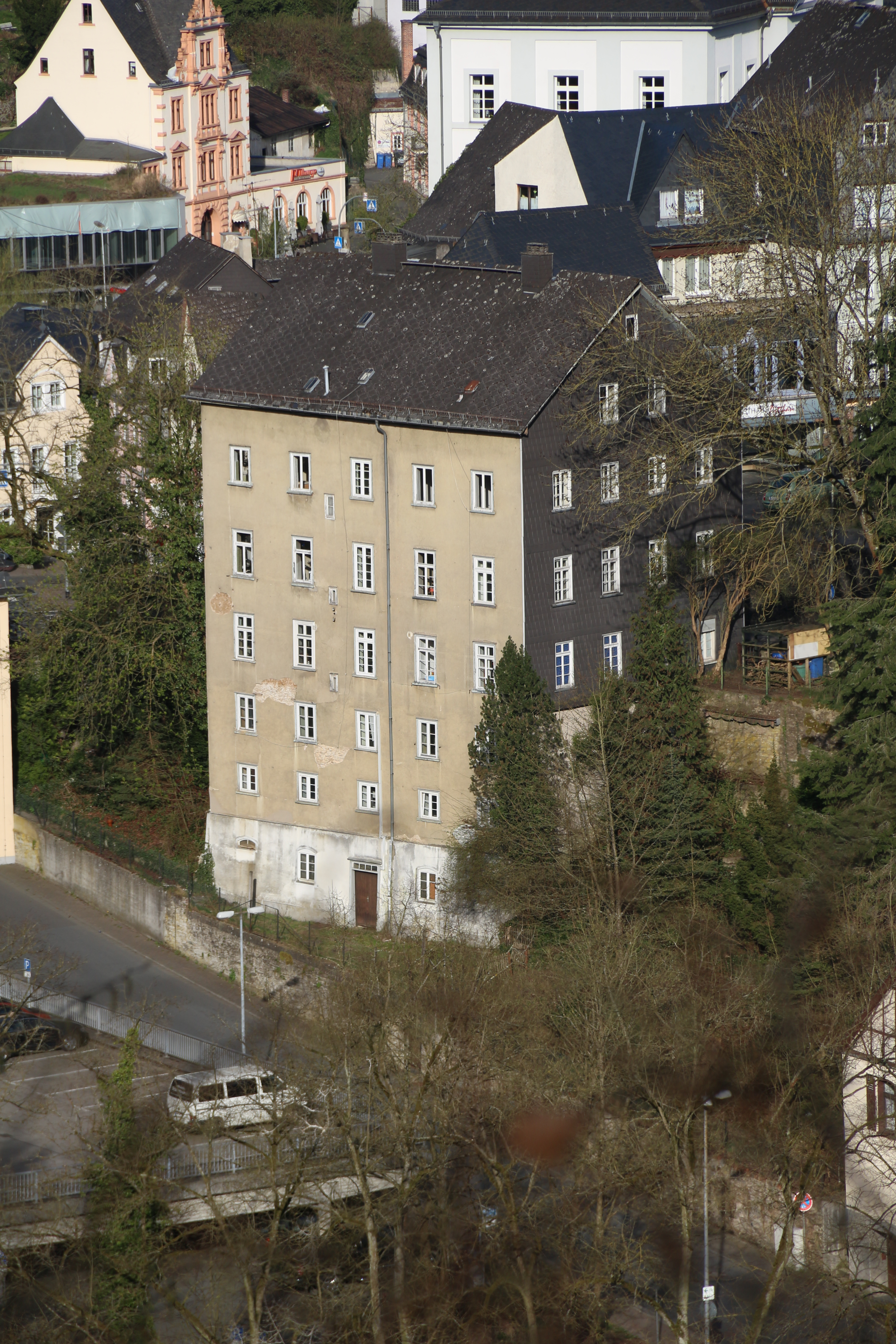 Weilburg